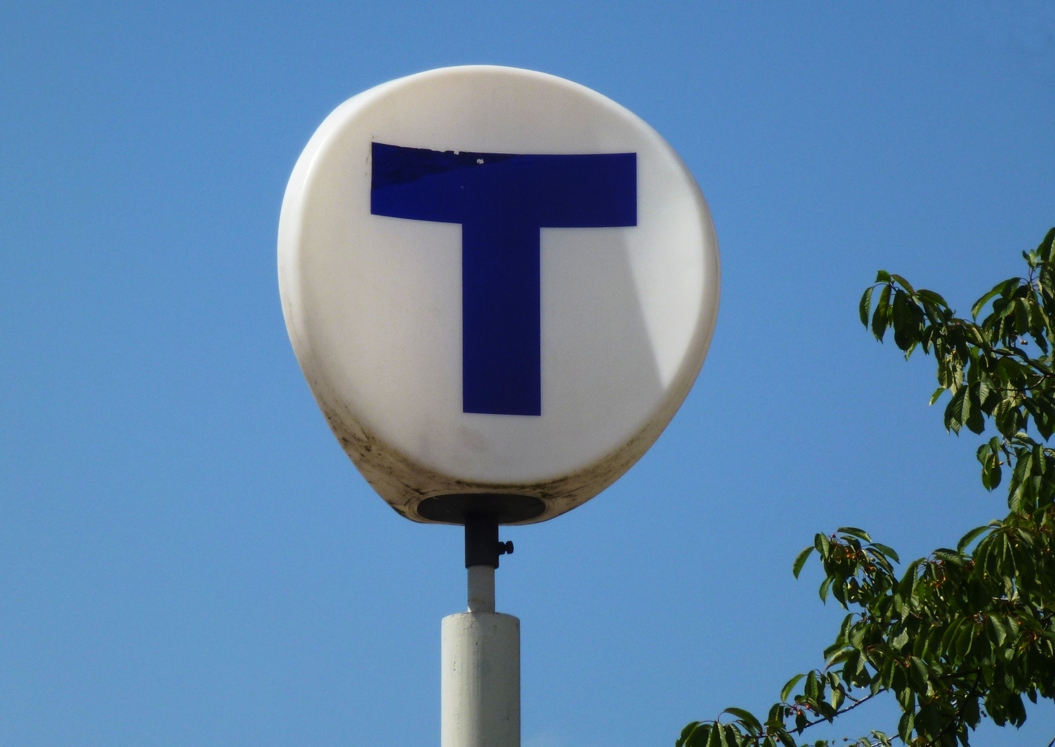 T-symbolen, Stockholms tunnelbana, ursprungligen skapat av konstnären Kalle Lodén.